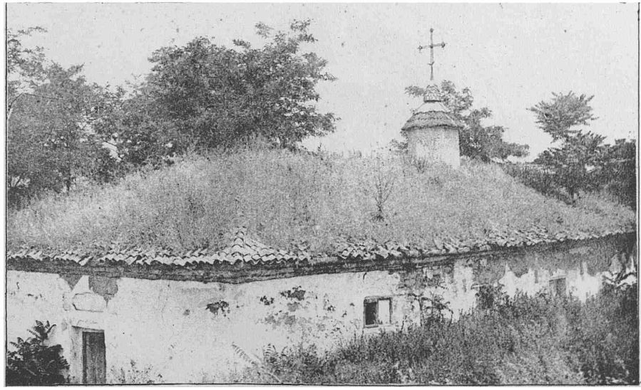 Cea mai veche imagine cunoscută a Bisericii din Căuşeni, singura biserică din fosta Mitropolie a Proilaviei care a supravieţuit până în prezent. Imaginea este reprezentativă pentru modul cum erau construite bisericile din teritoriile aflate sub stăpânire otomană, având o construcţie similară cu biserica Sfinţii Arhangheli din Brăila, sediul Mitropoliei Proilaviei, dărâmată în 1846.